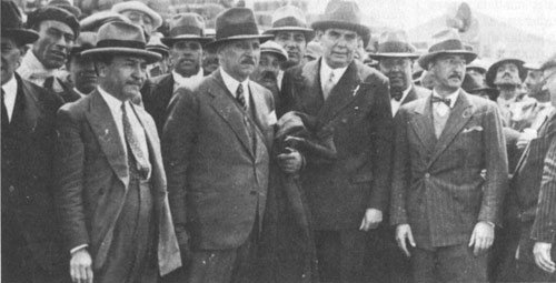 n San Julian, Santa Cruz 1933. Desde la izquierda, los doctores Alberto Aybar Augier, Honorio Pueyrredón, José P. Tamborini y Carlos Noel, recién llegados al paraje donde se los confinó.